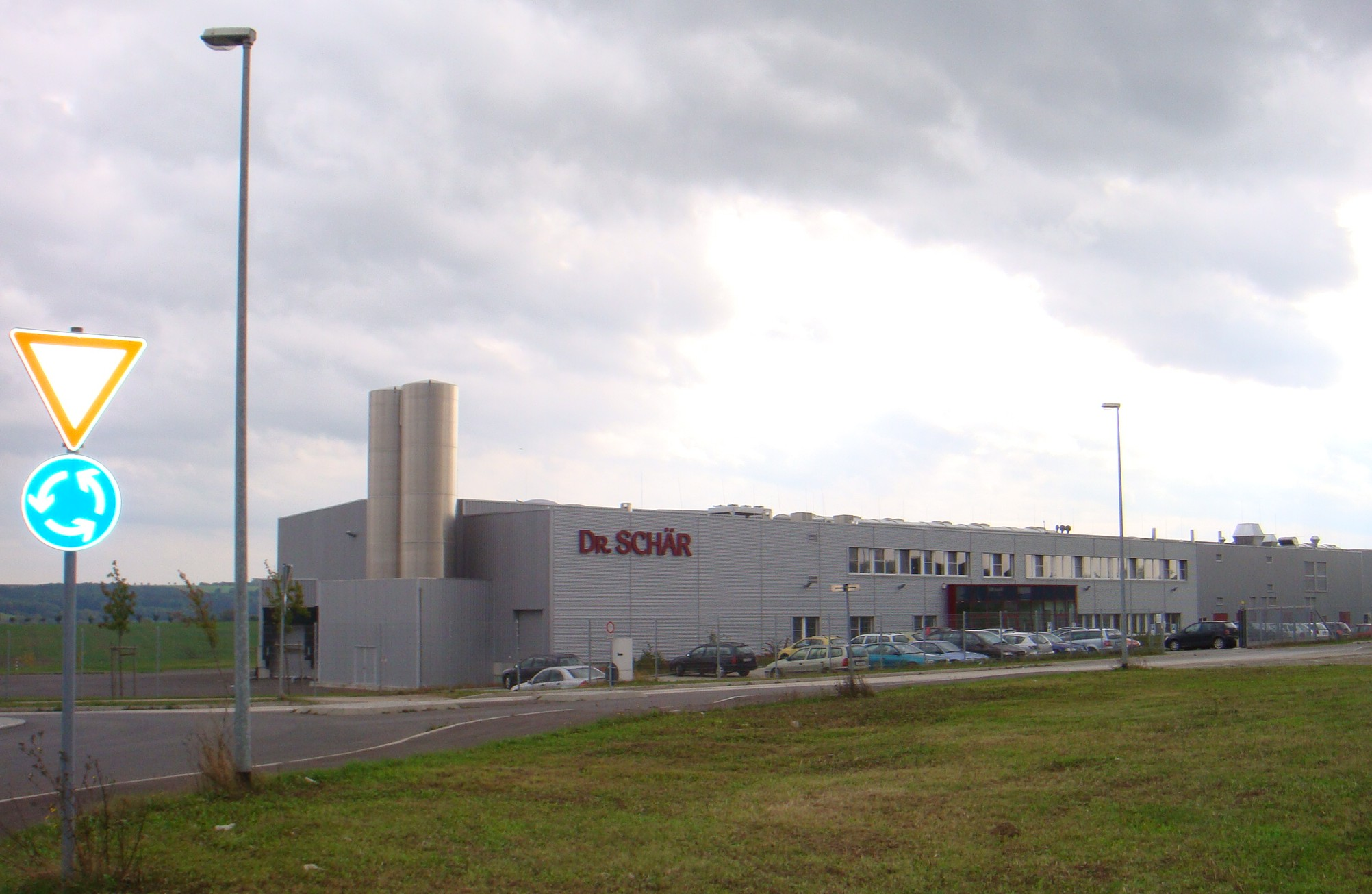 Firma Dr.Schär